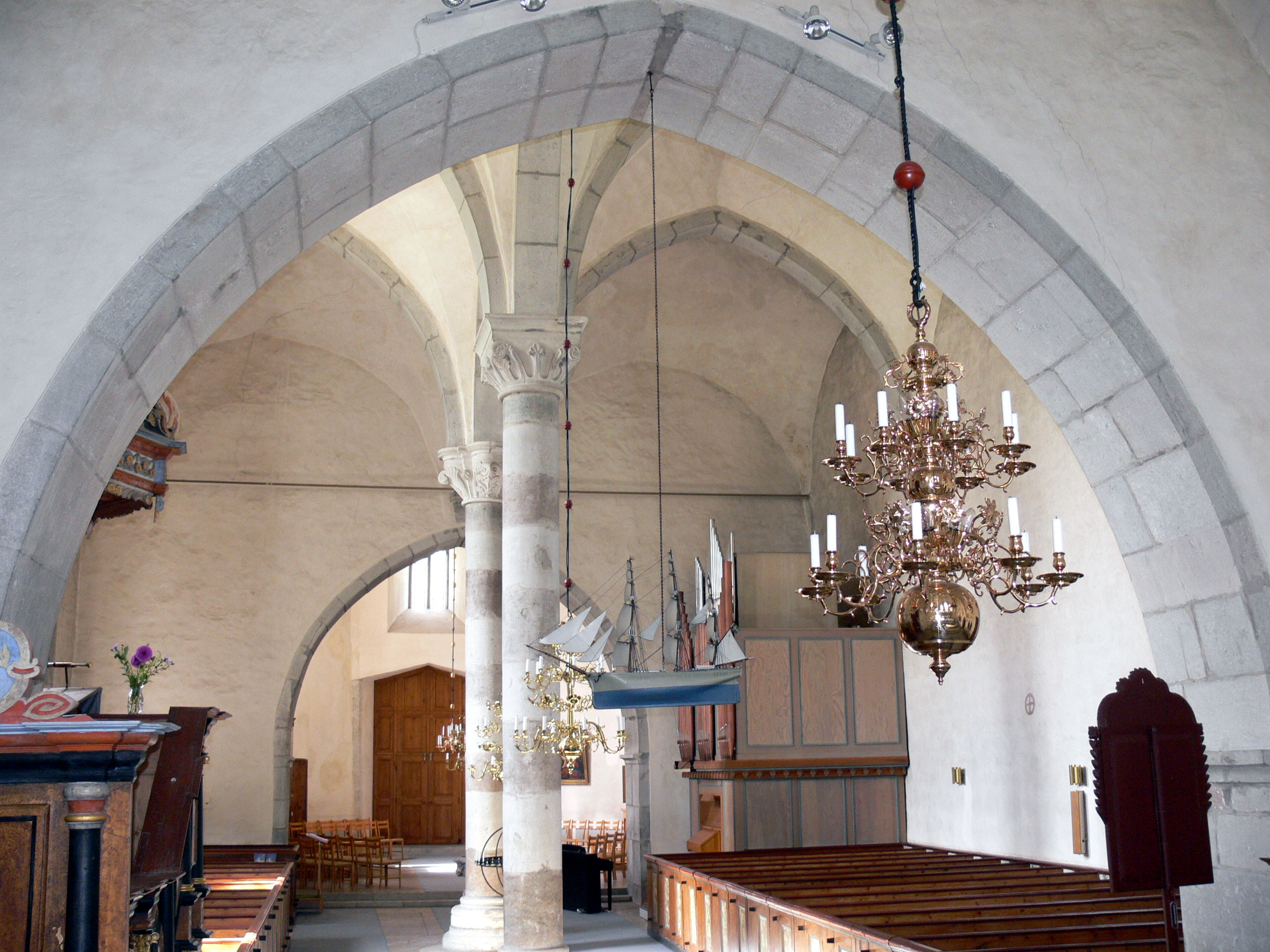 Lärbro kyrka auf Gotland. Innenraum